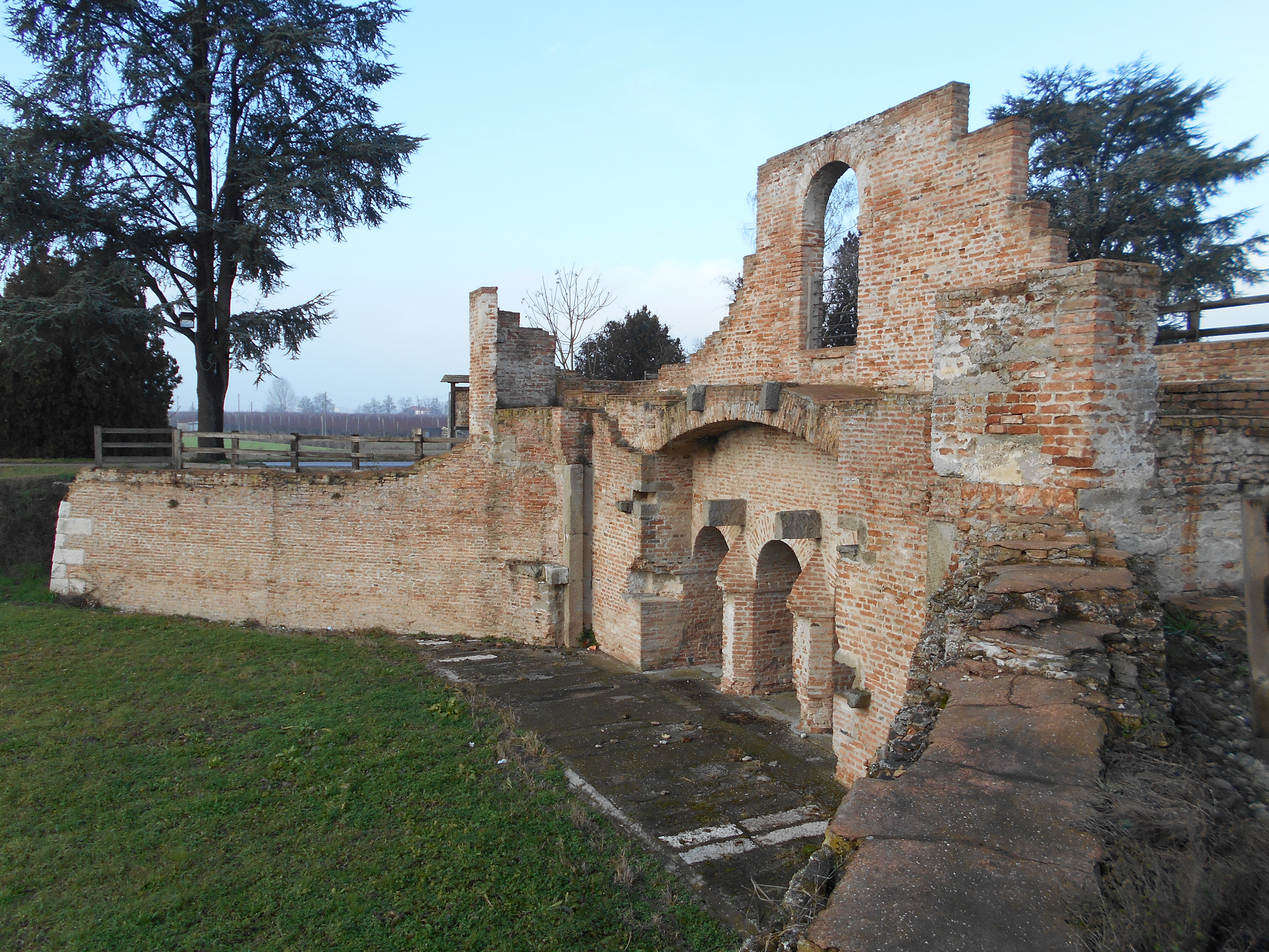 Rotta Sabbadina o Rotta Sabadina, opera idraulica veneziana, Barbona - Sant'Urbano